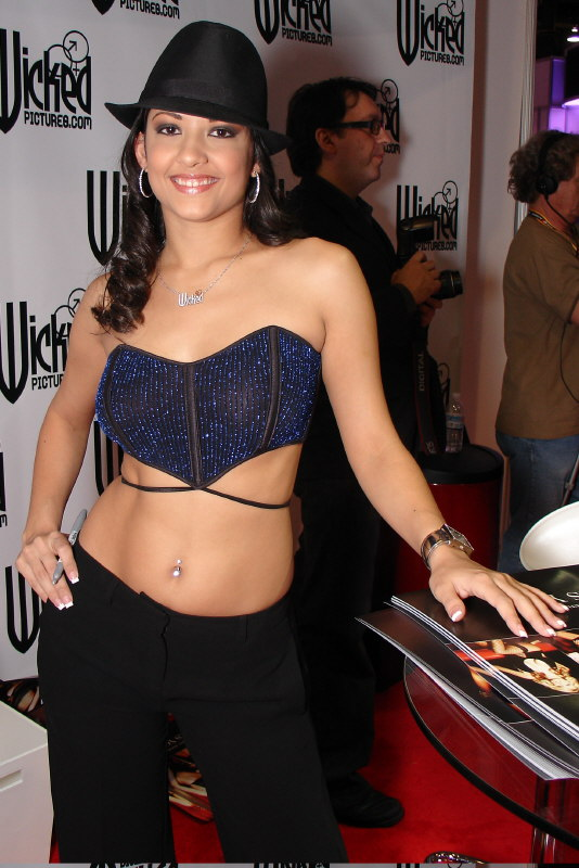 Carmen Hart